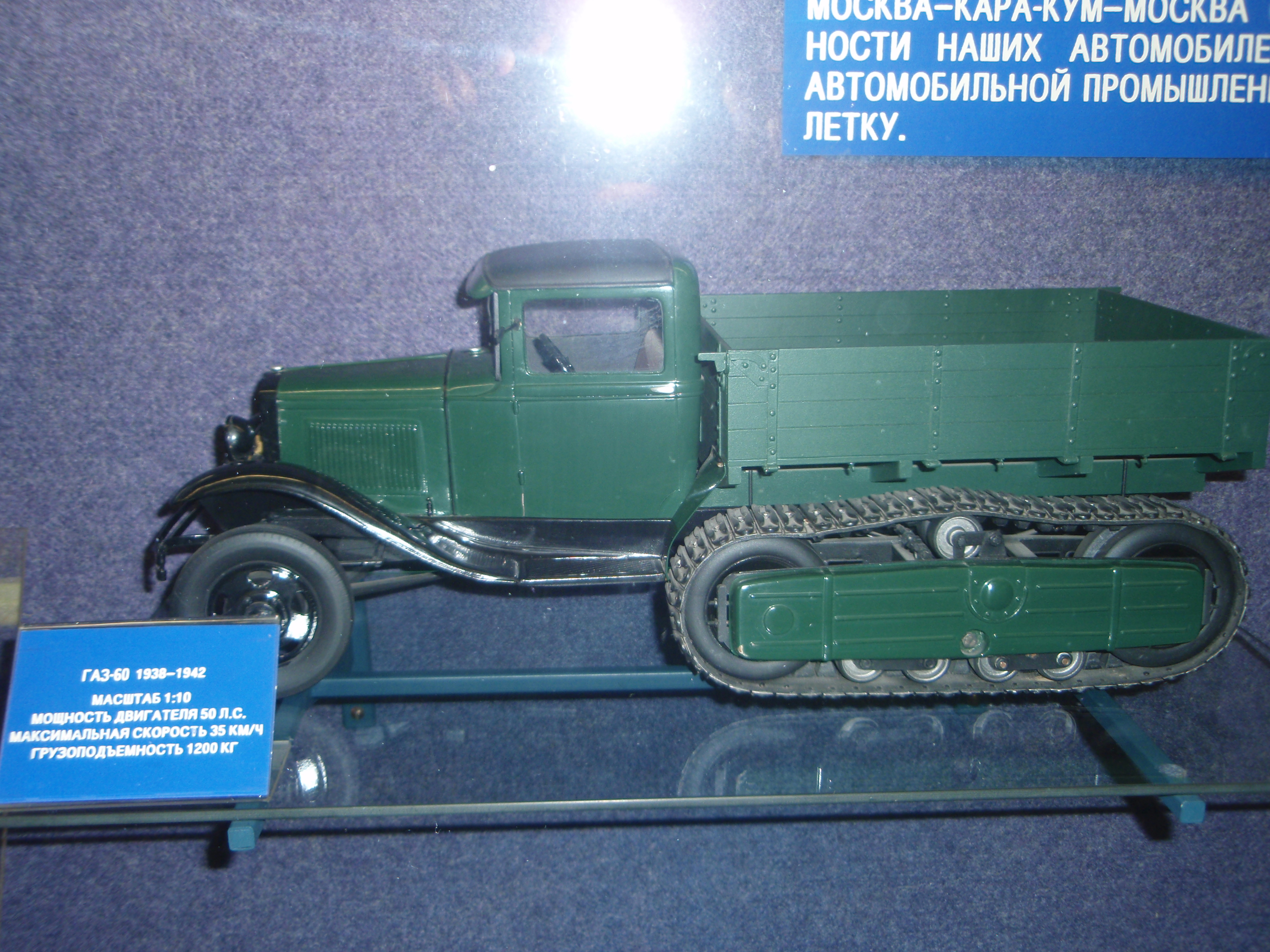 Советский грузовик ГАЗ-60 (модель), Государственный Политехнический музей (г.Москва)